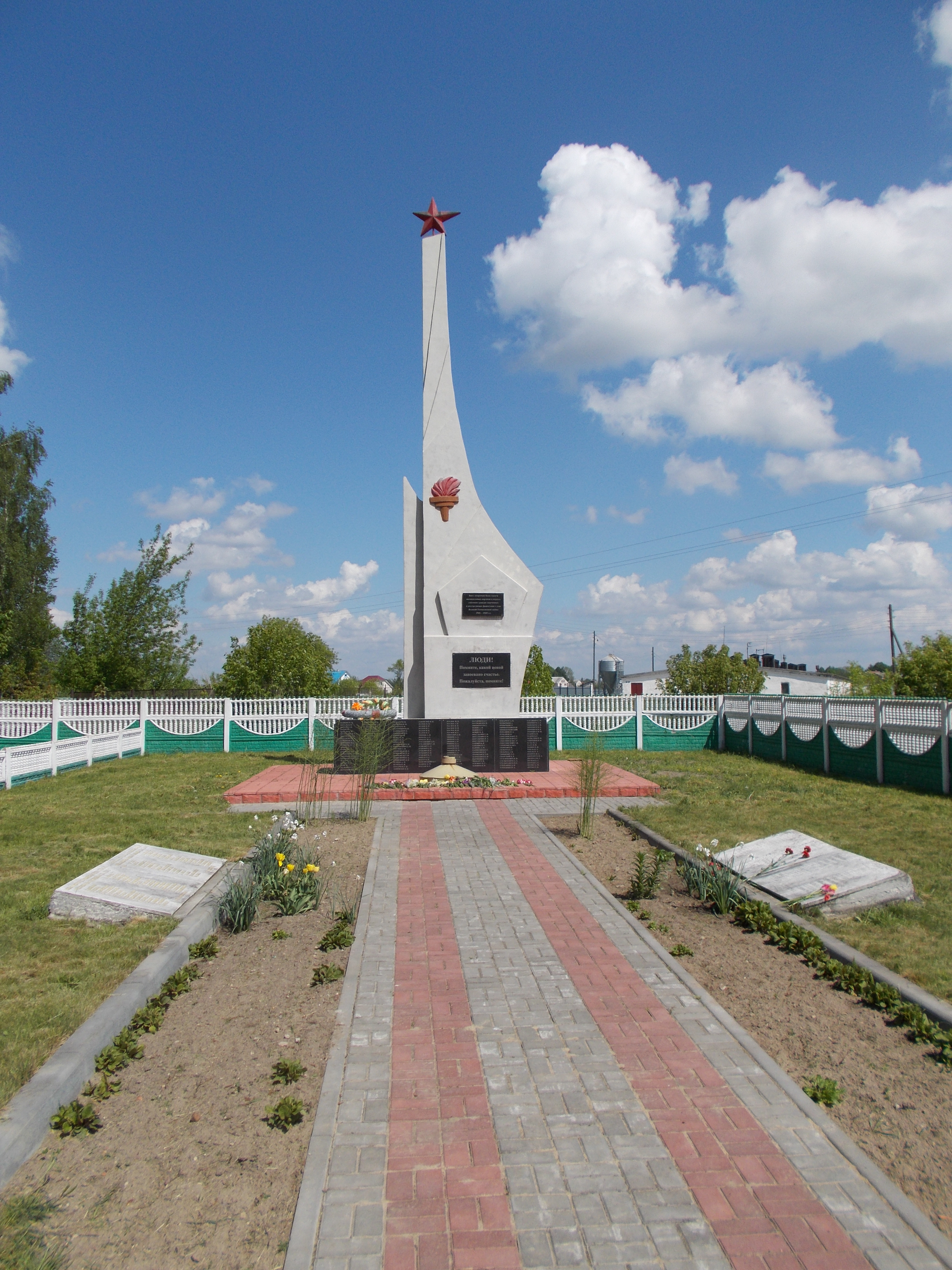 Мемориал в Иваново Бресткой области убитым нацистами евреям, военнопленным и партизанам. Находится на улице Пушкина у дома № 13.